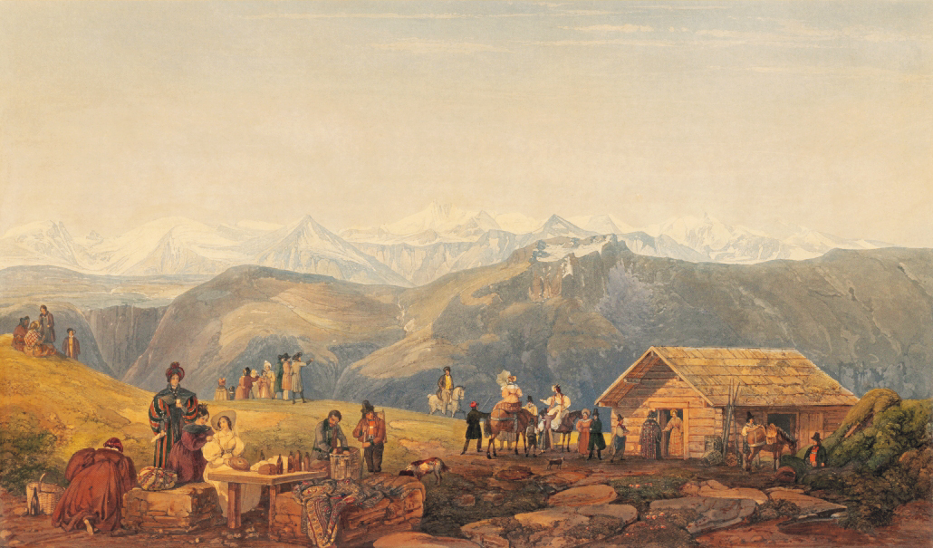 Erste Gamskarkogelhütte, erbaut von Erzherzog Johann, darstellend den „Besuch der noblen Gesellschaft", mit dem Erbauer (das Gebirge erklärend — von links Sonnblick, Hocharn, Großglockner bis zum Wiesbachhorn); im Vordergrund seine Gemahlin Anna, geb. Plochl.